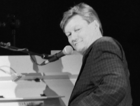 Jukka Gustavsson Kanneltalossa 4.3.2013